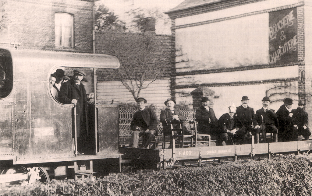 Une commission d'inspection sur le Chemin de fer de Normandie